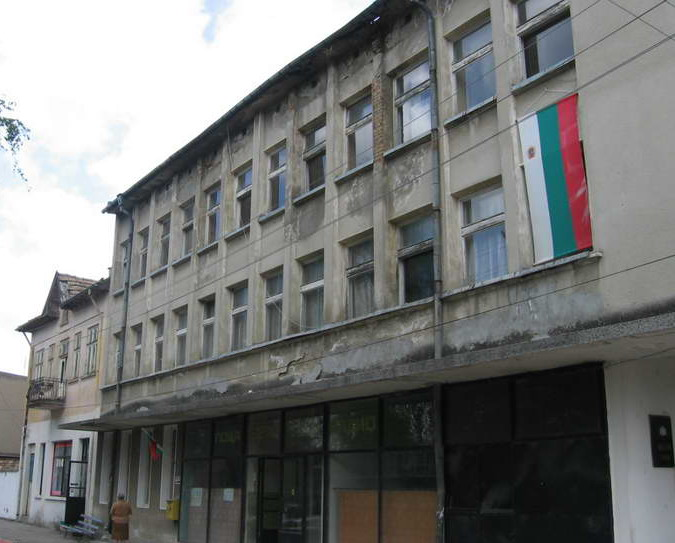 Сградата на кметството в село Славяново, Поповско - 2006 год.